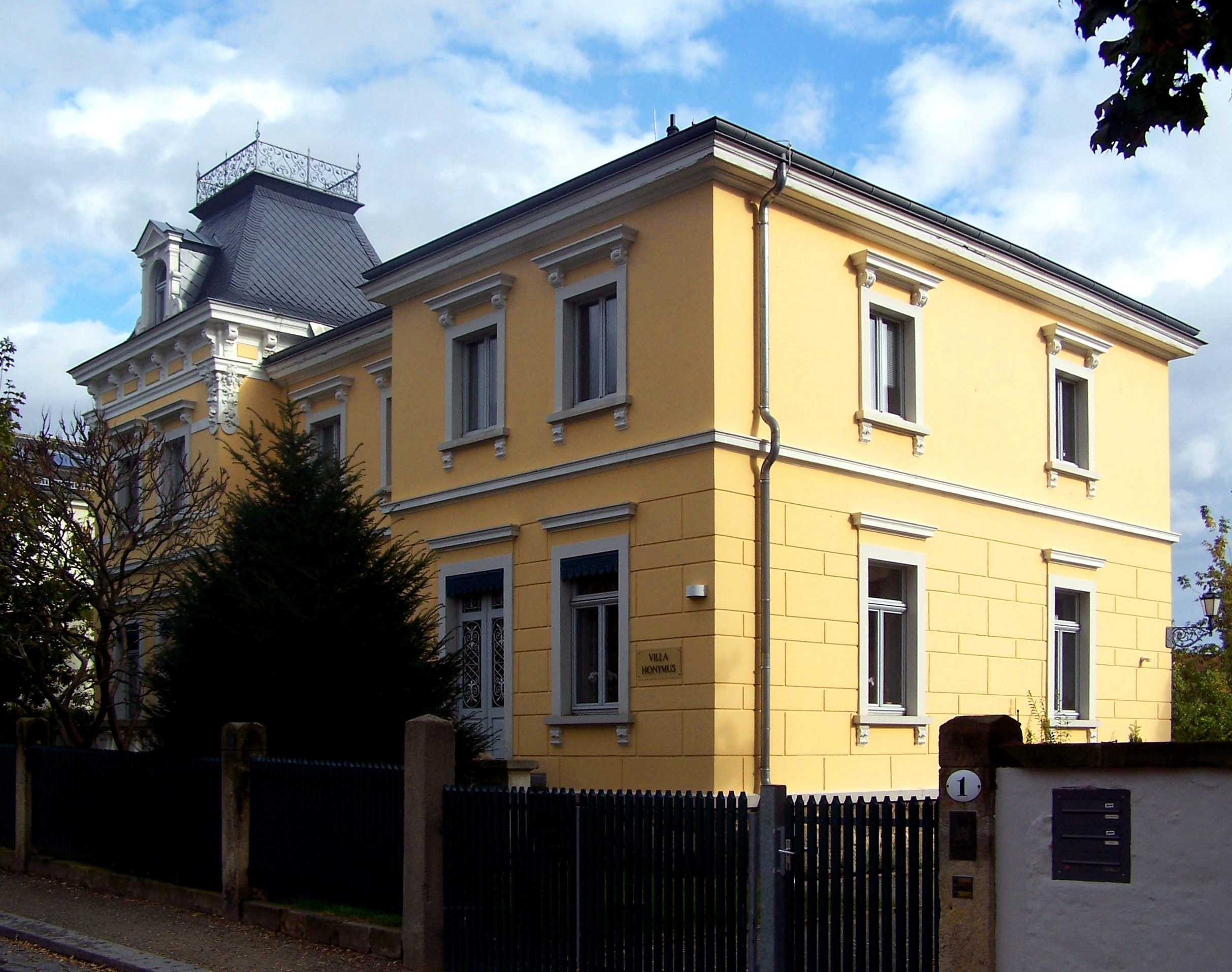 Goethestr. 1 in Radebeul